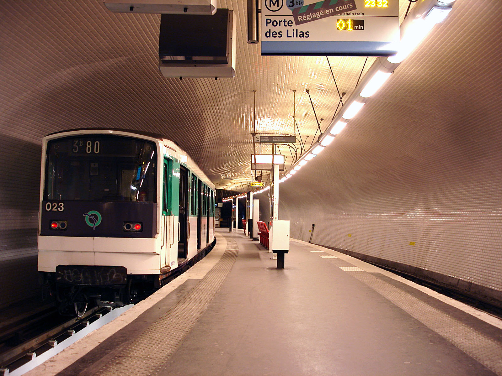 La station Gambetta de la ligne 3 bis du métro de Paris, France.